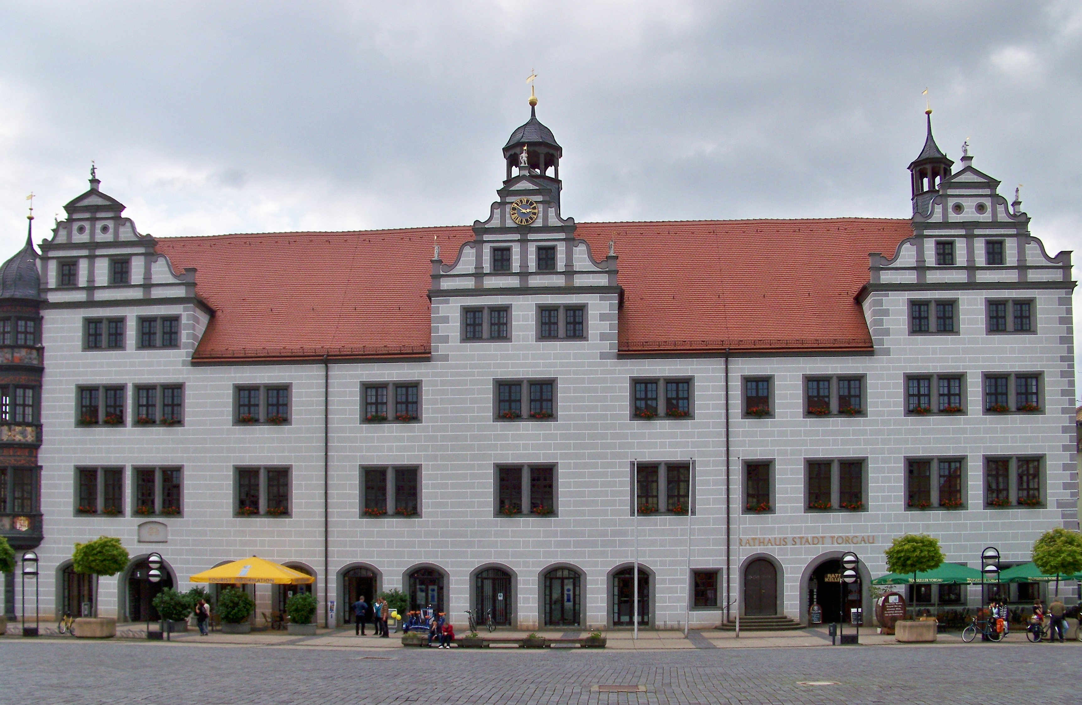 Rathaus am Marktplatz in Torgau